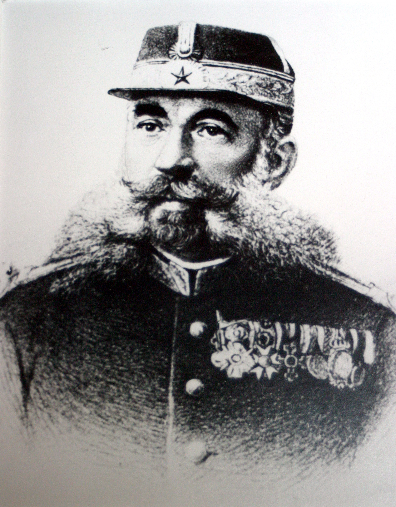 Colonelul Eustasie Pencovici.